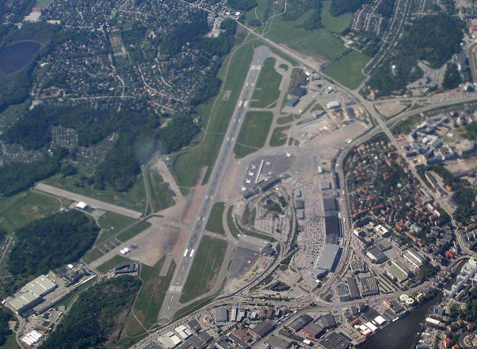 Flughafen Stockholm-Bromme